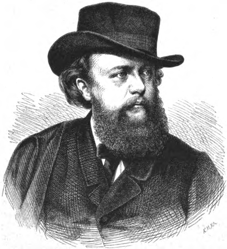 Robert Cauer der Ältere, deutscher Bildhauer im 19. Jh.